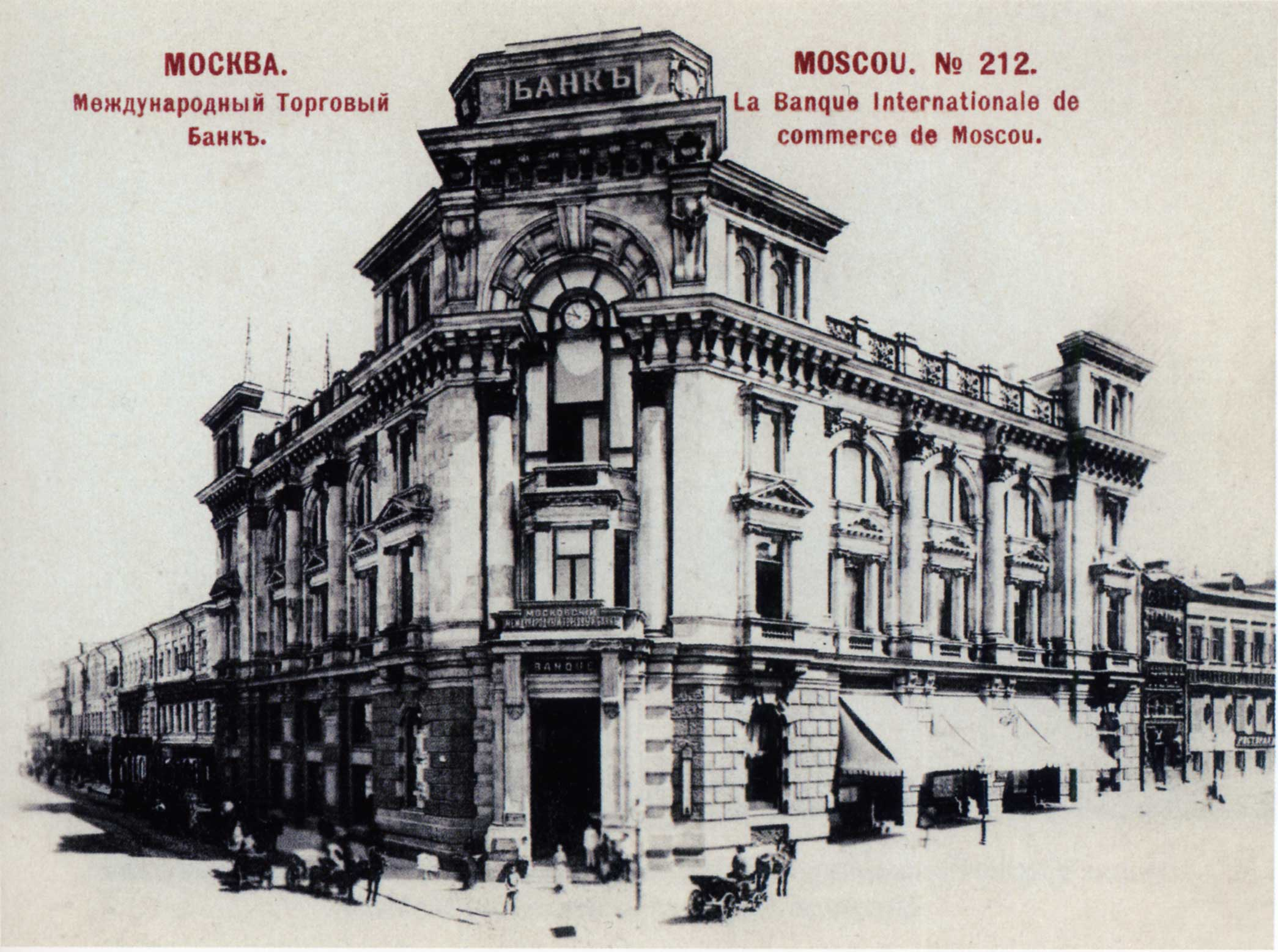 Московский международный торговый банк, открытка начала XX века